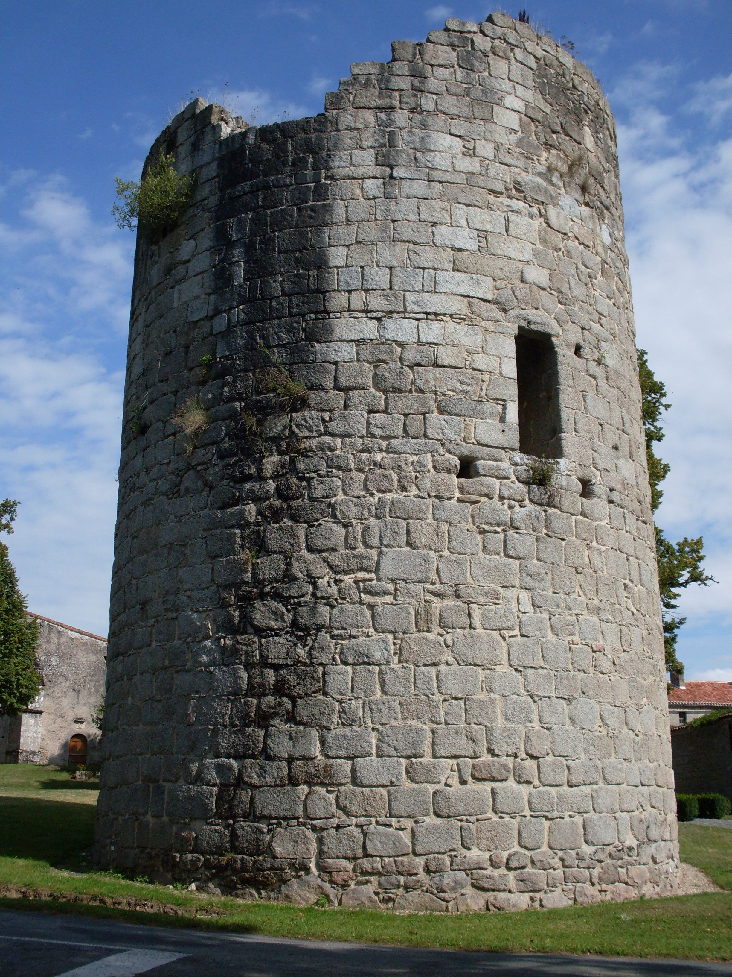 Le donjon, XIe siècle, du Bourdeix.